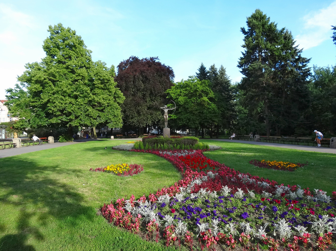 Rzeźba Łuczniczki autorstwa prof. Ferdinanda Lepcke odsłonięta w 1910 r. w Bydgoszczy